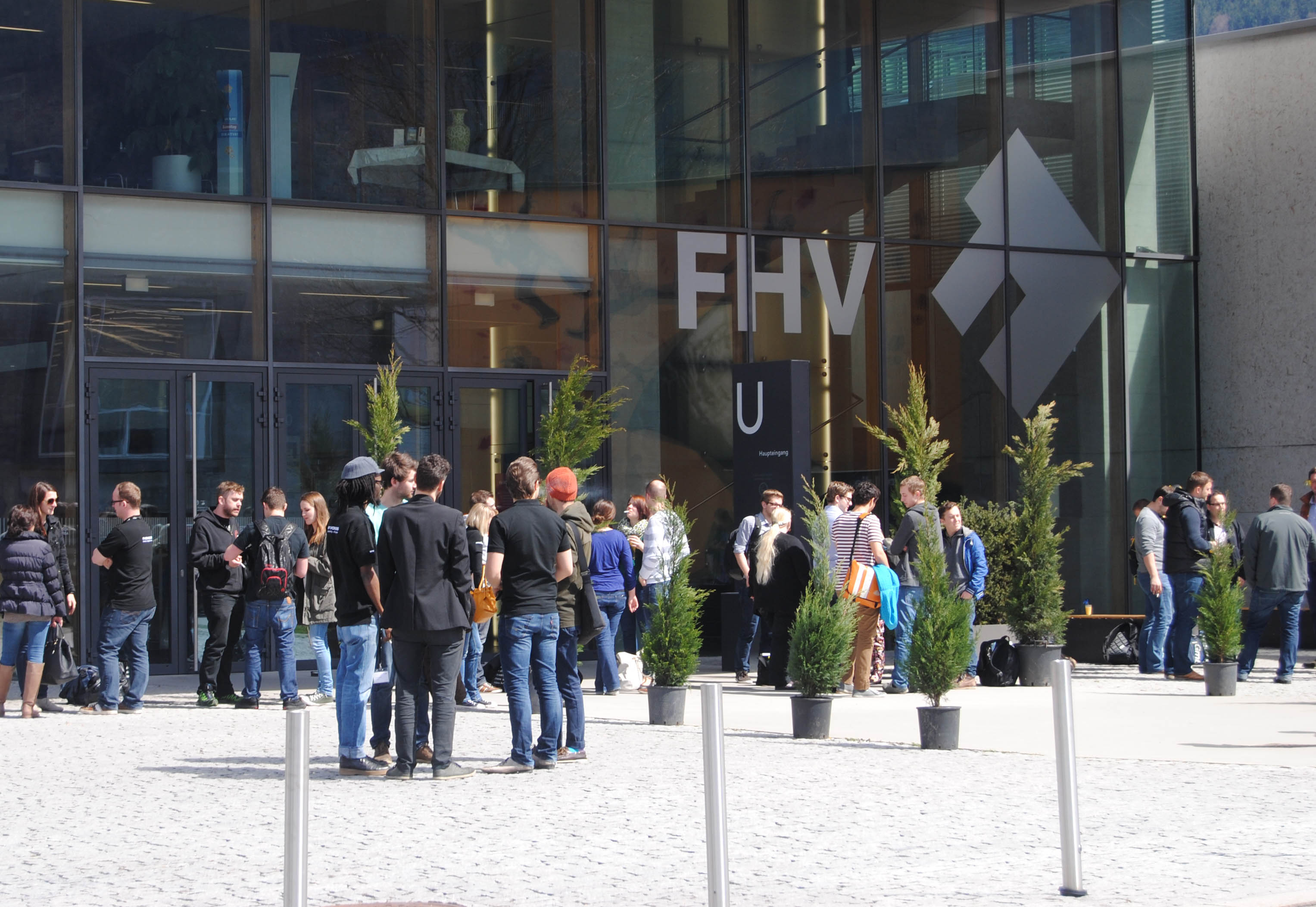 Haupteingang des Neubaus der FHV